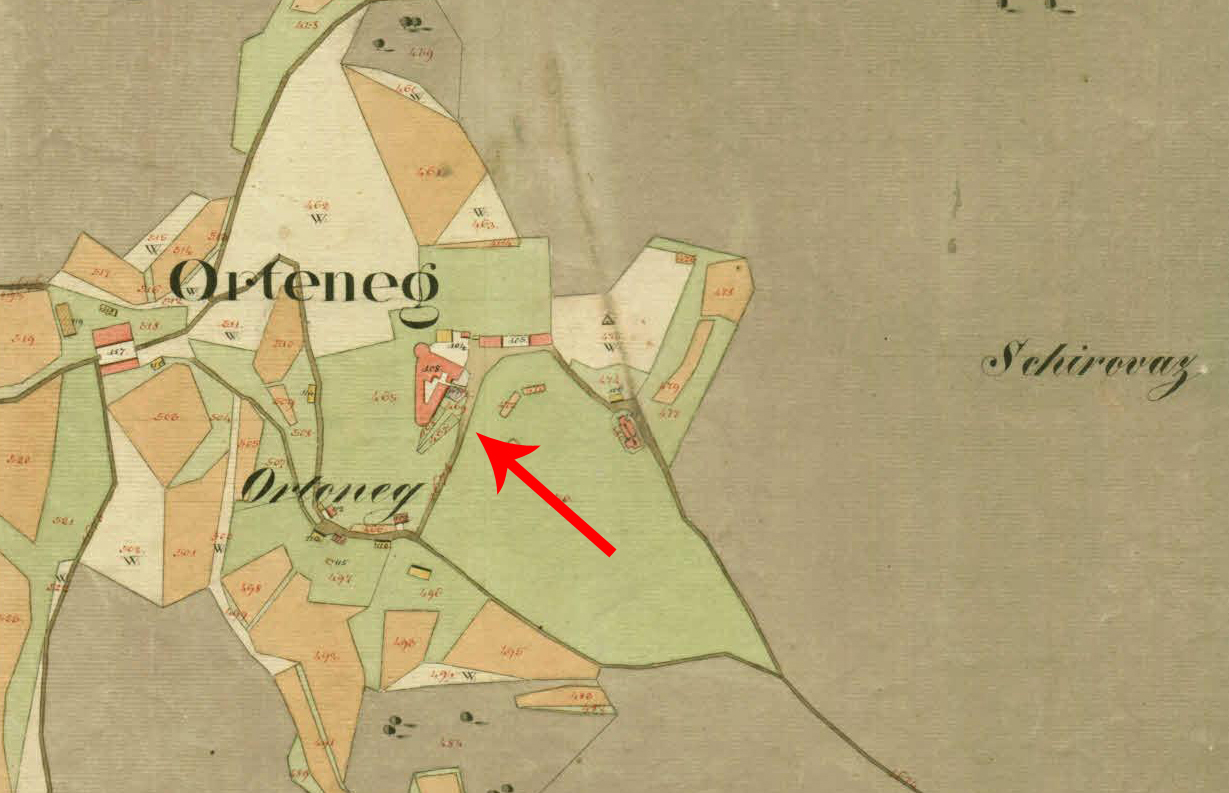 Franciscejski kataster za Kranjsko, 1823-1869